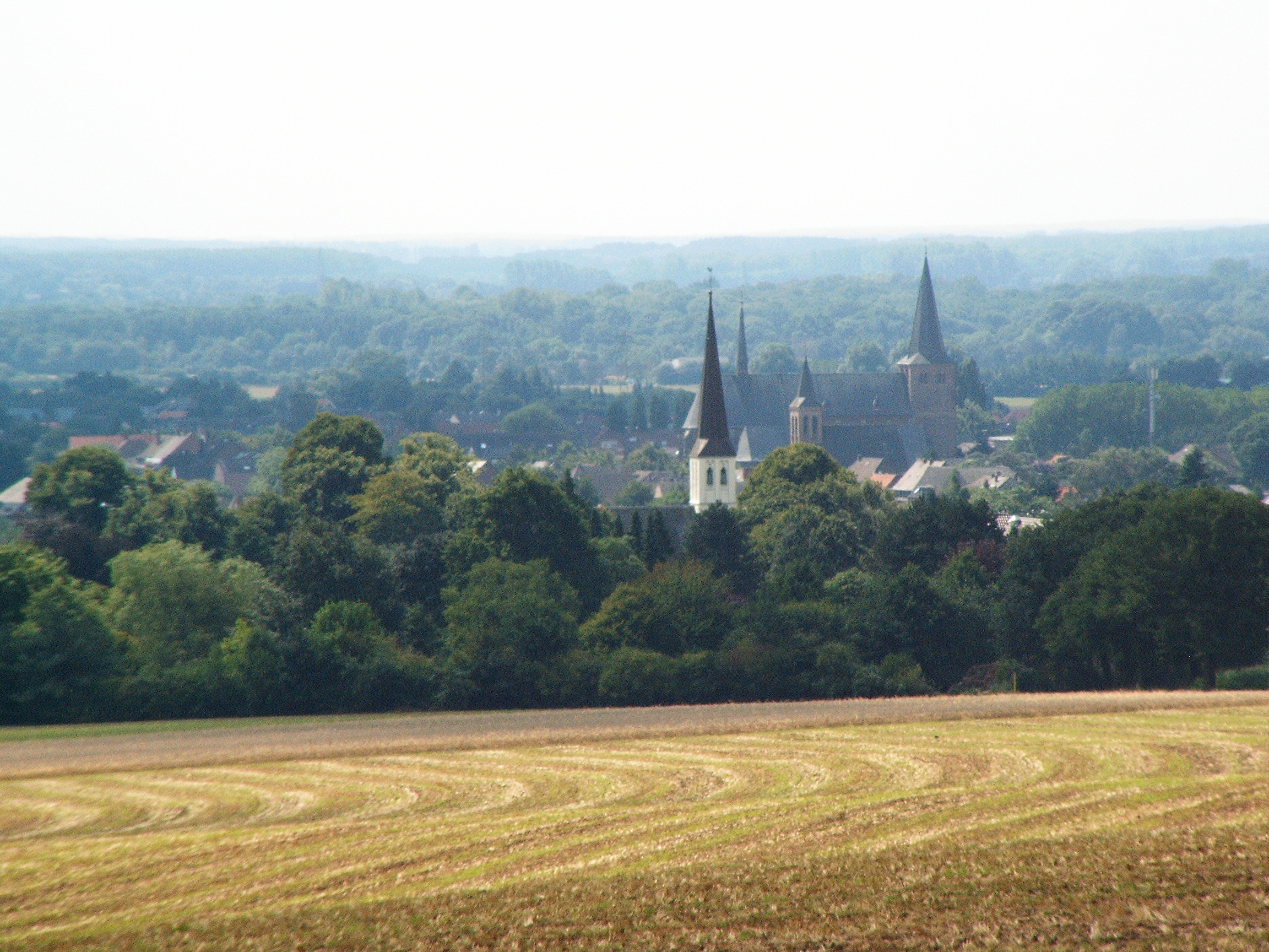 Sonsbeck vom Balberg gesehen